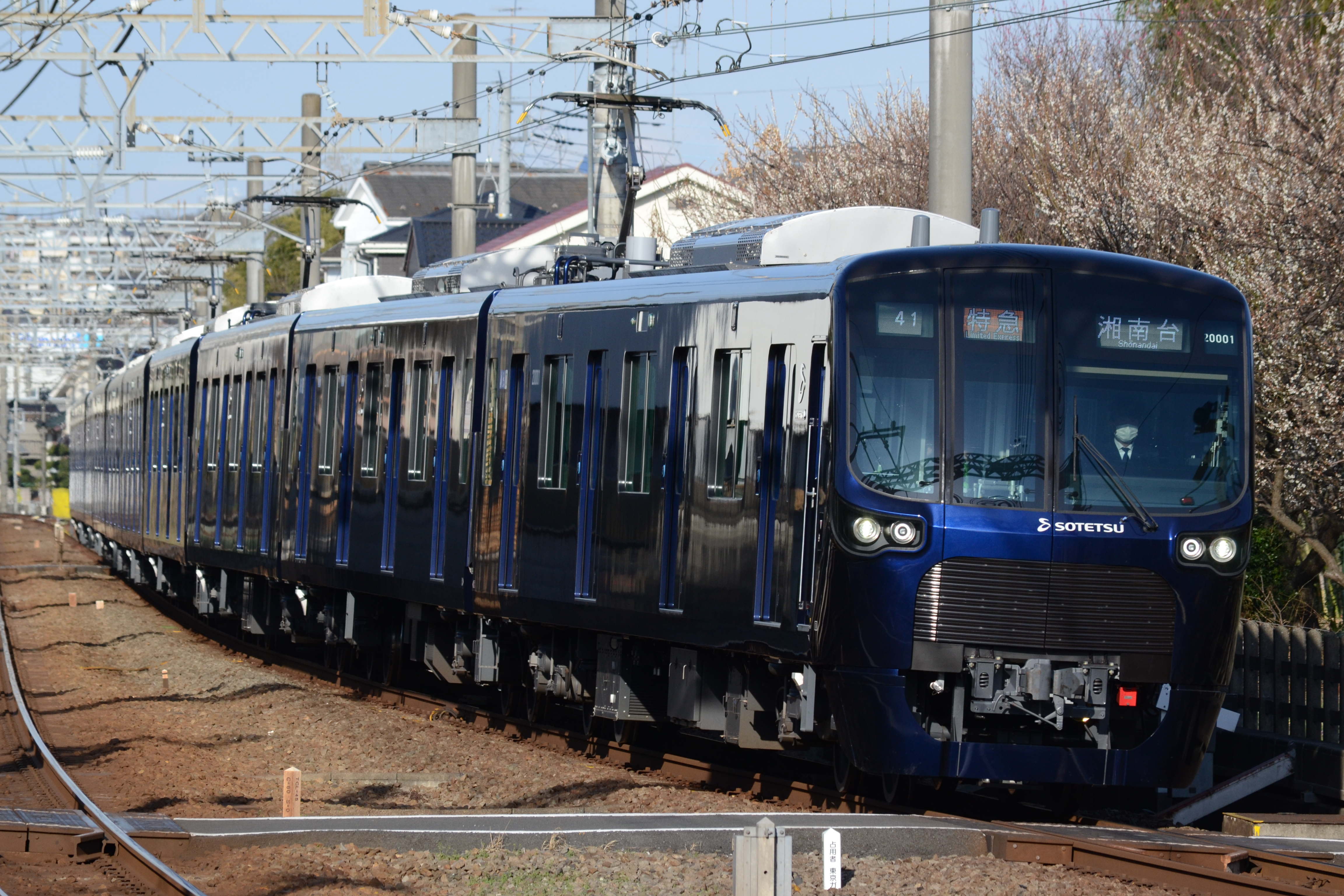 相鉄本線、鶴ヶ峰－二俣川間を走行する相鉄20000系